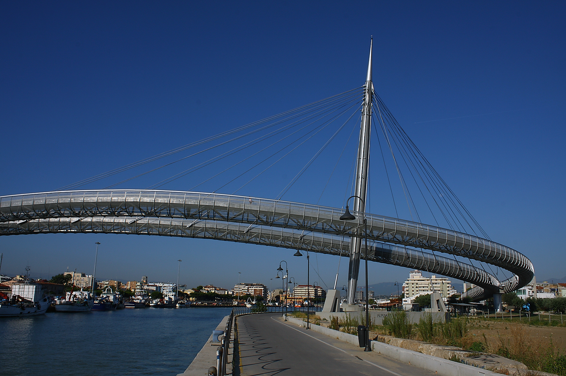 Ponte del mare, Italy, Pescara